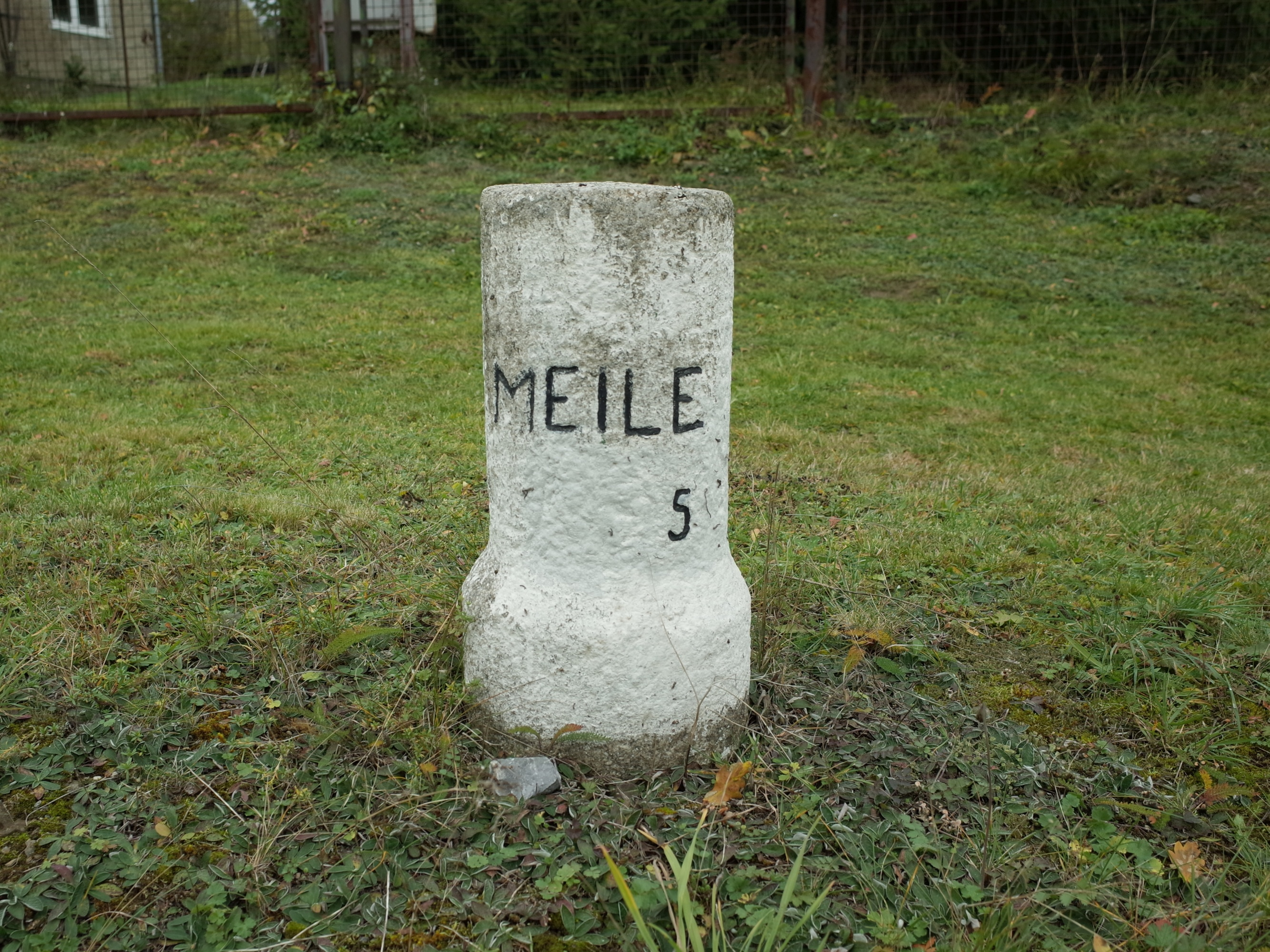 Harzgerode, Ortsteil Güntersberge, Distanzstein, Rundsockelstein (Viertelmeilenstein) mit Angabe Meile 5